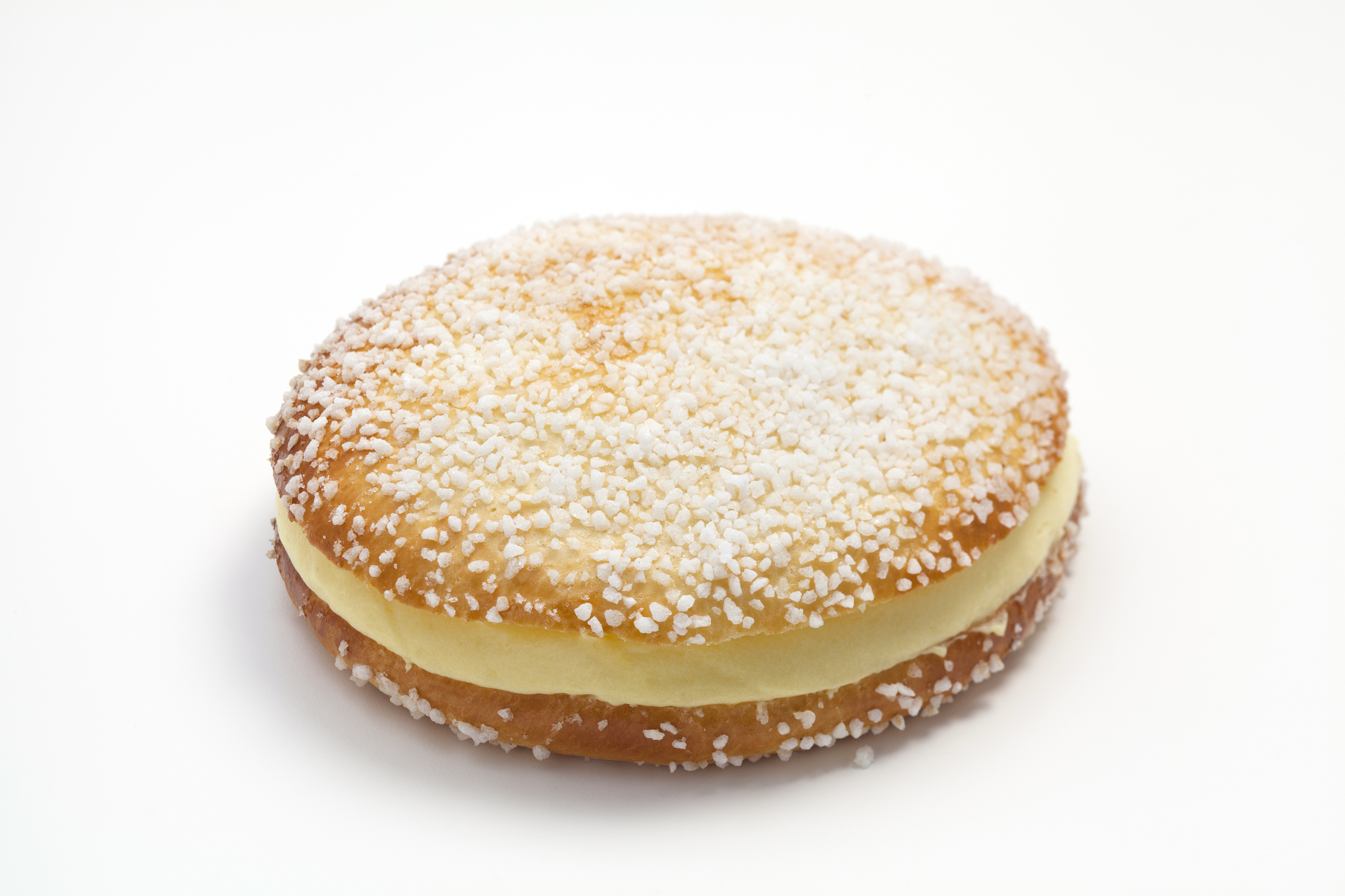 Picard: "Souvent imitée, jamais égalée" La Tarte Tropézienne du créateur Alexandre Micka